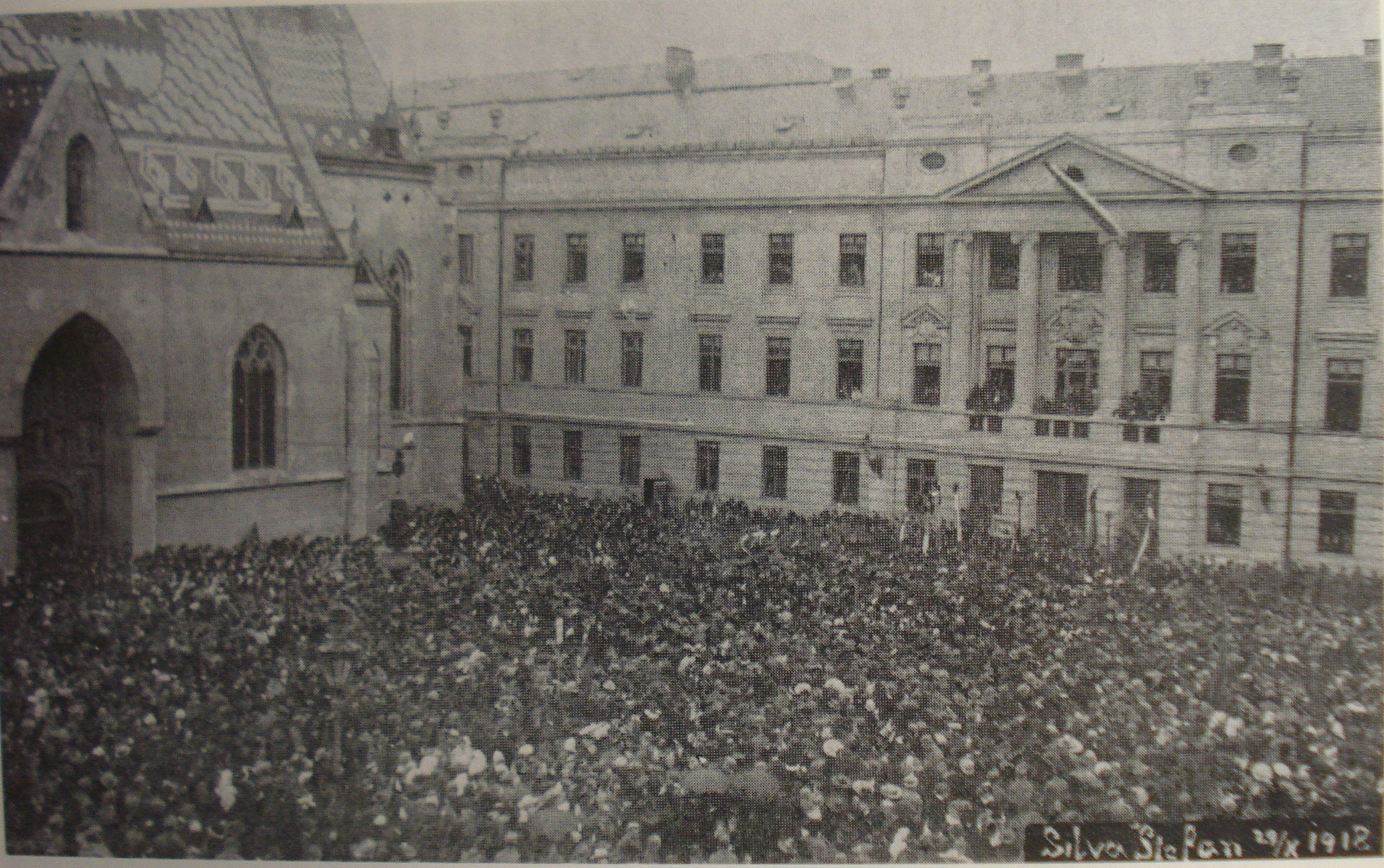 Objava o raskidu veza s Austrijom i Ugarskom, Trg sv. Marka, 29.10.1918.